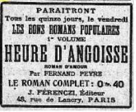 Annonce publicitaire passée dans La Matin du 11 décembre 1916 par l'éditeur Joseph Férenczi.